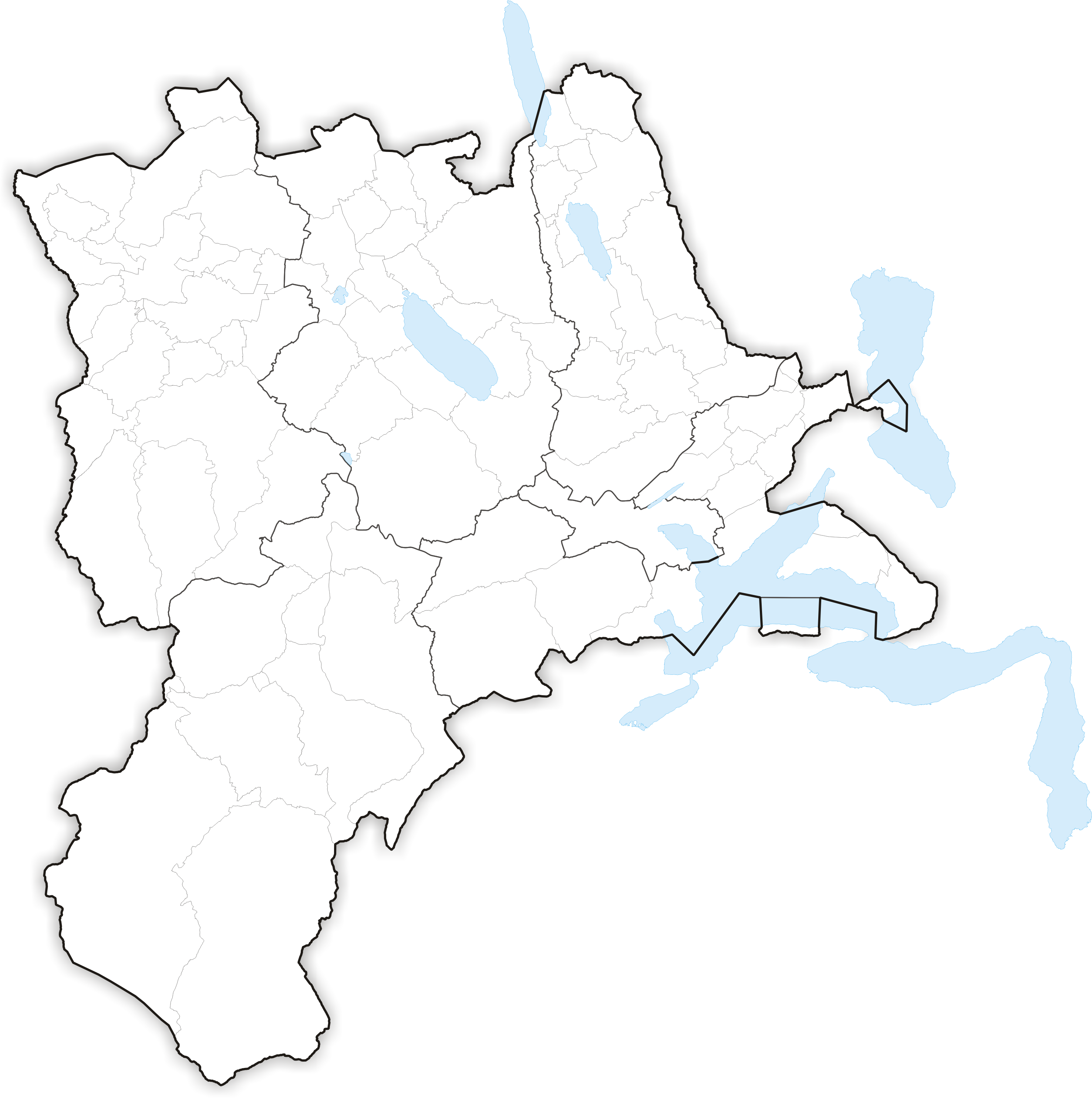 Municipalities in Canton Luzern